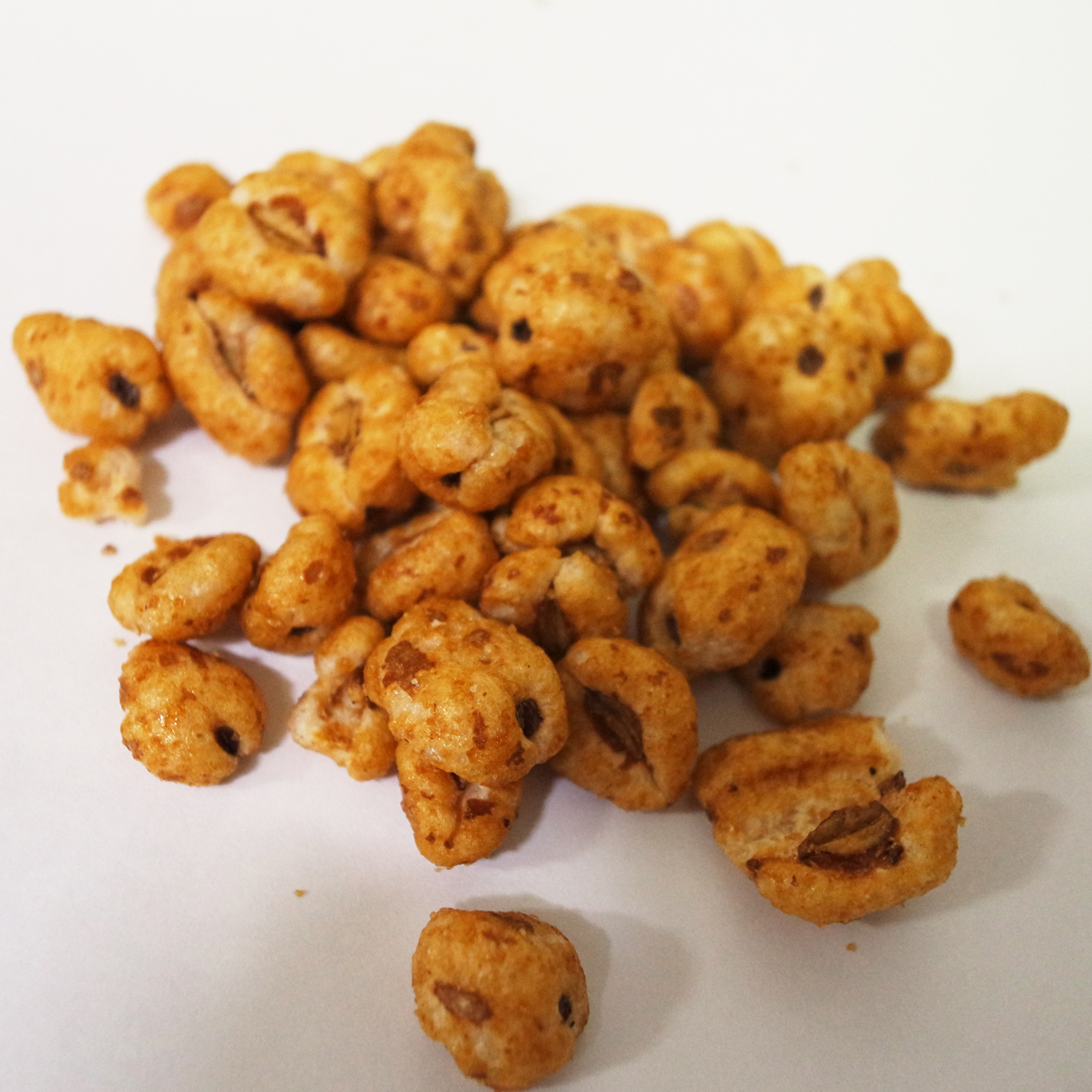 죠리퐁 확대